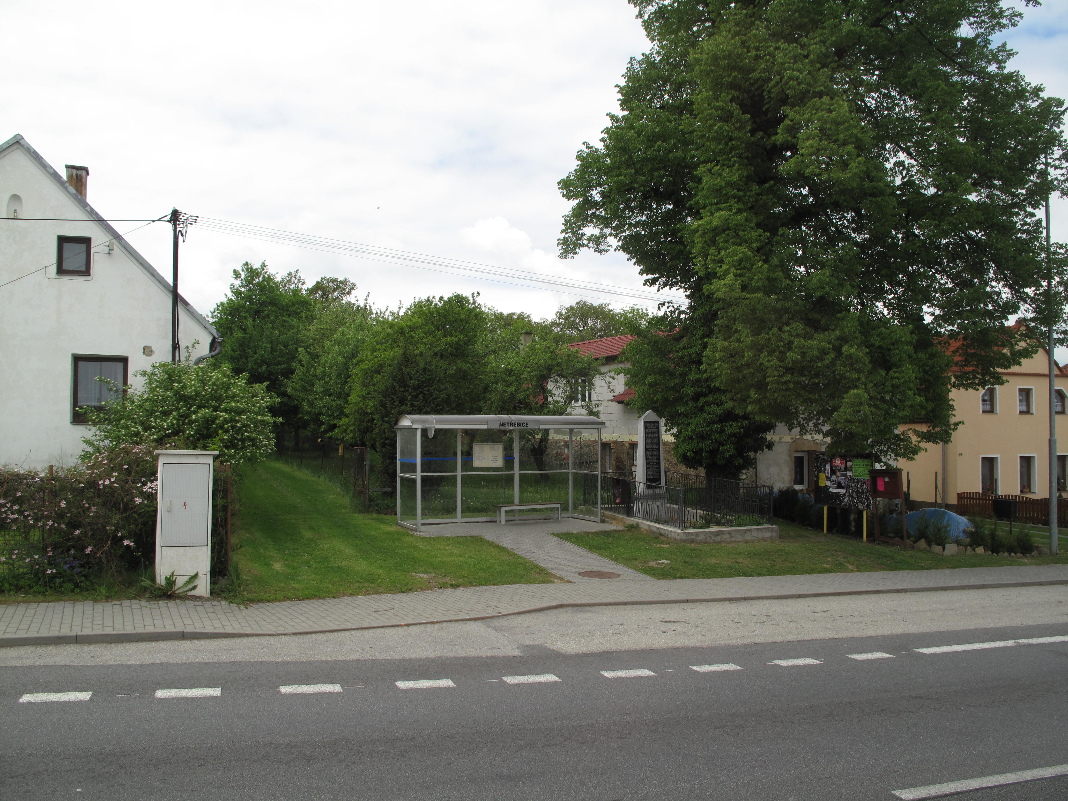 Netřebice